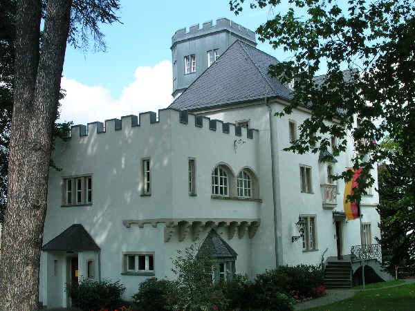 Obere Burg von Rheinbreitbach, 15. Jahrhundert